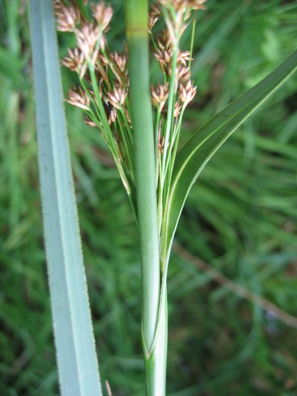 Binsenschneide (Cladium mariscus), Müritz-Gebiet